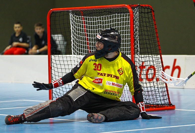 Pascal Meier, Schweizer Unihockeytorhüter